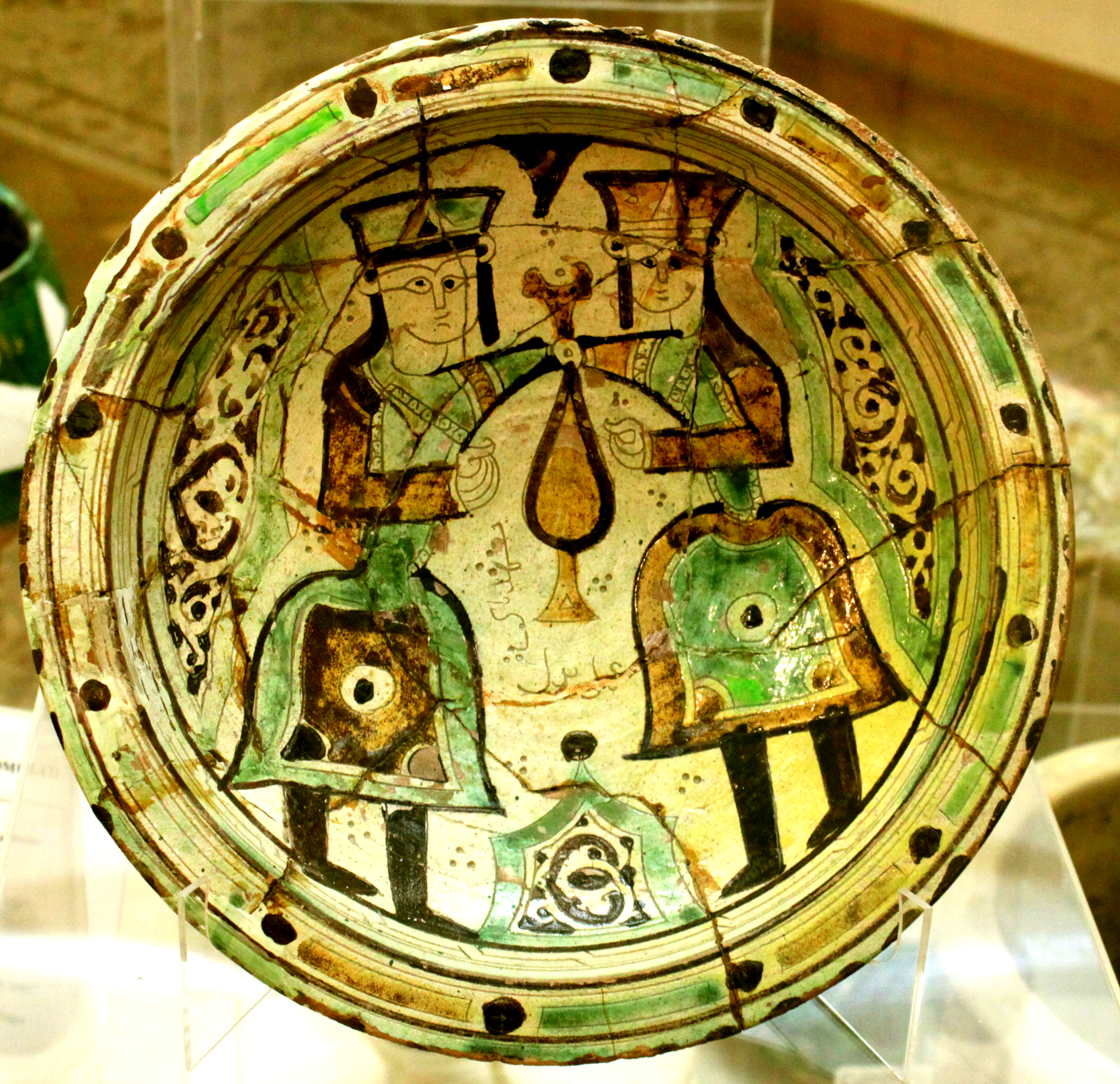 Beyləqandan aşkarlanmış Elxanilər dövrünə aid saxsı boşqab